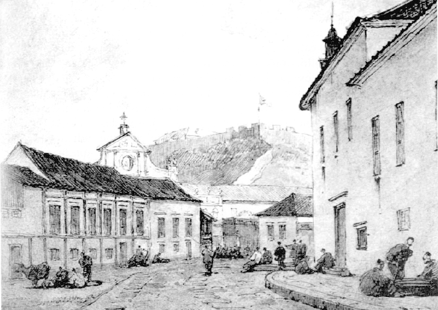 Dominikanerkonvent in Macau 19. Jhd., Aquarell von George Chinnery